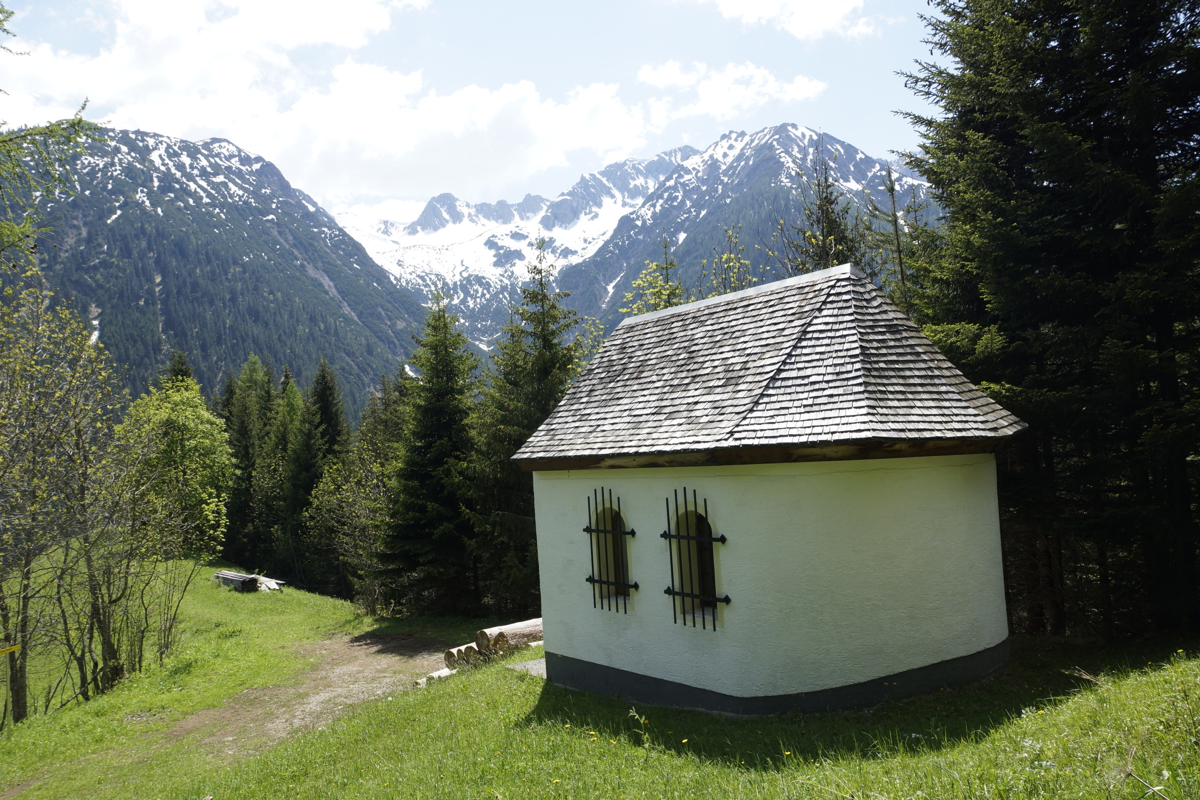 Kapelle Hl. Martin im Bschlaber Tal (Lechtaler Alpen). Im Hintergrund rechts der Bildmitte Zirmebenjoch (2407m, hinten) und Umsinner (2200m, davor). Die begrünte Erhebung links ist die Mutte (2048m)